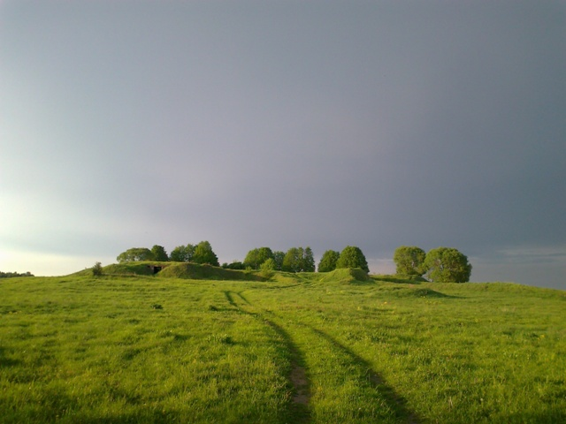 Замчышча ў Галоўчыне